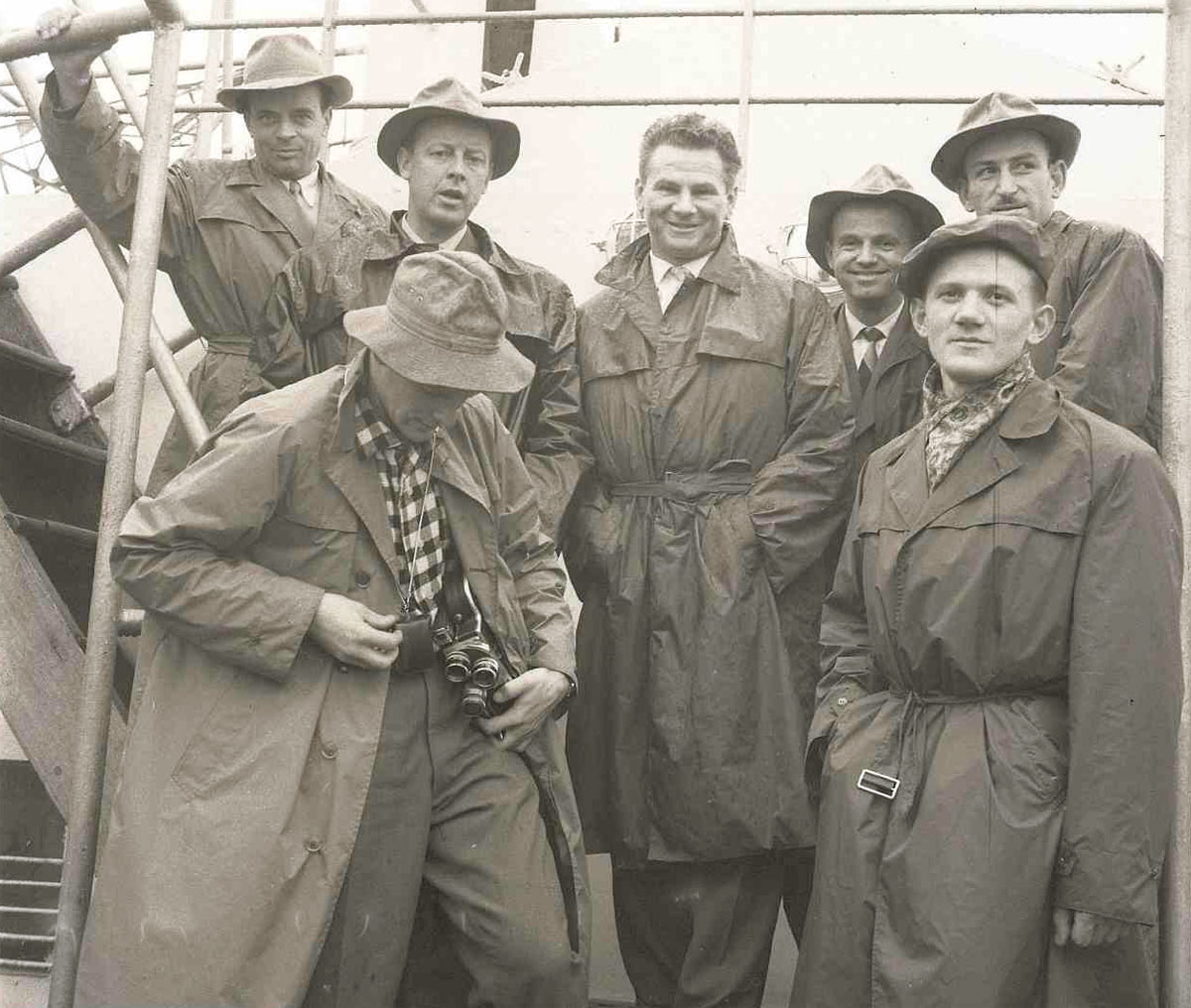 Alpinistična himalajska odprava na indijski Trisul je z ladjo Velebit odpotovala z Reke. Foto: Edi Šelhaus/hrani Muzej novejše zgodovine Slovenije.